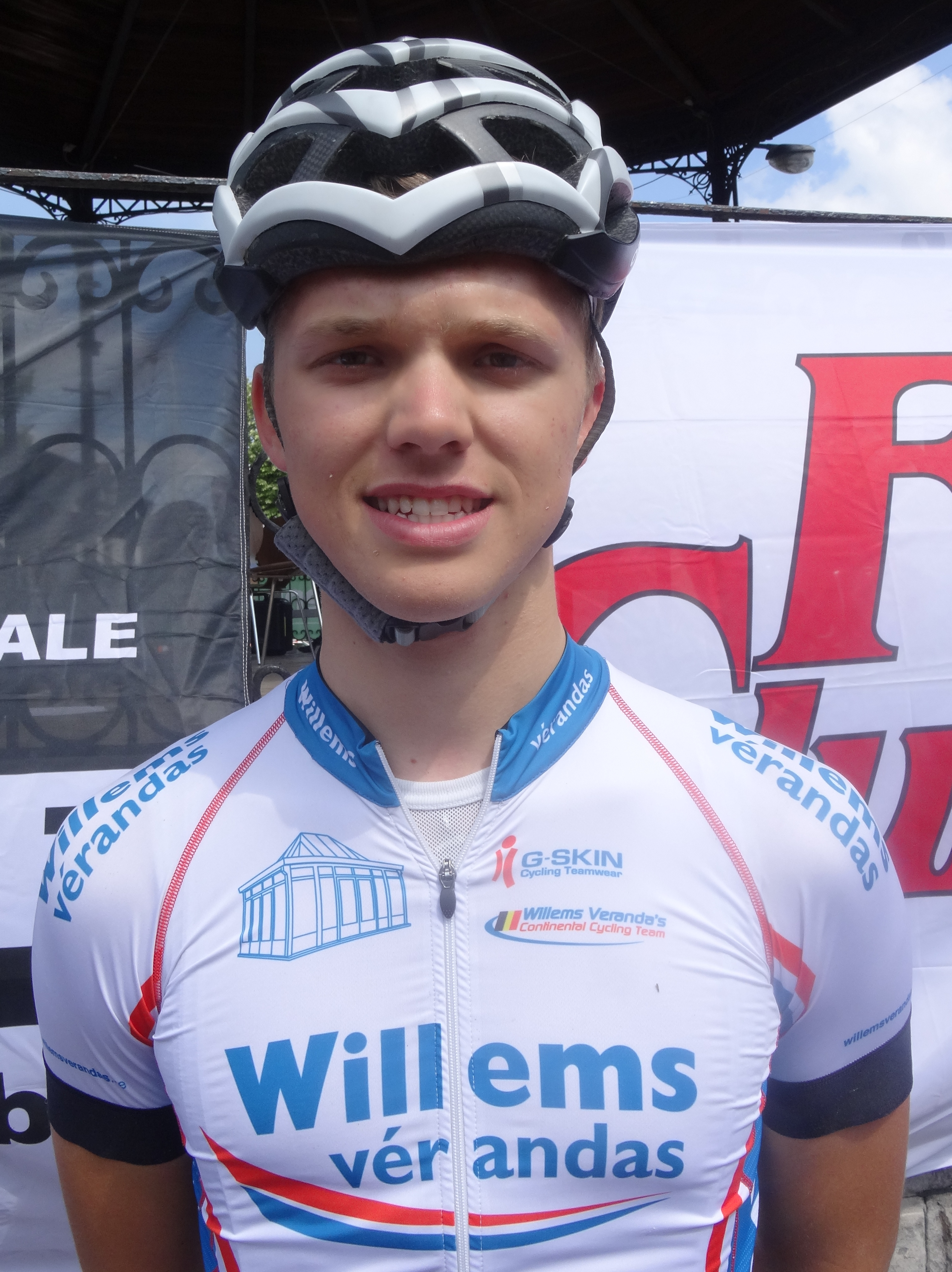 Reportage réalisé le samedi 17 mai à l'occasion du départ du Grand Prix Criquielion 2014 à Boussu, Belgique.